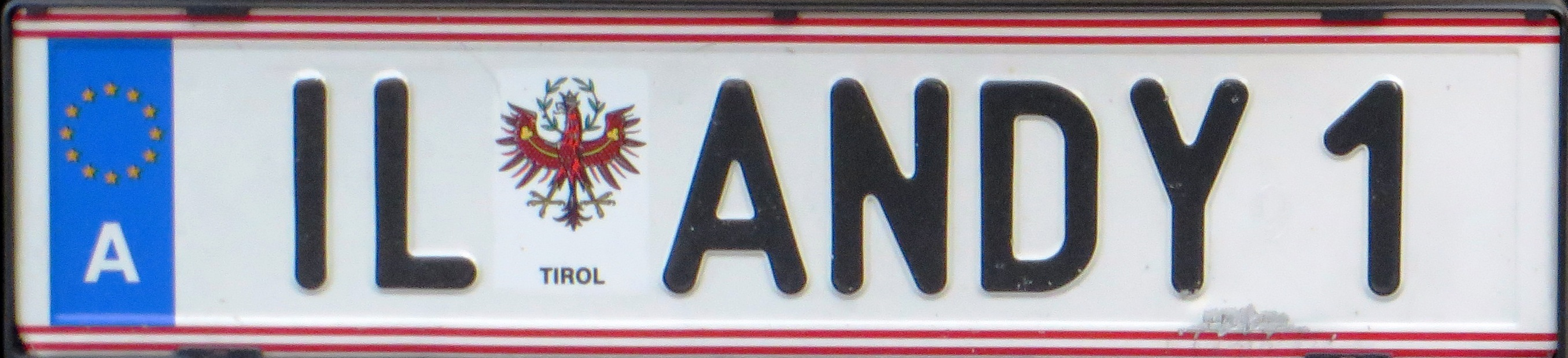 persoonlijke kentekenplaat Oostenrijk